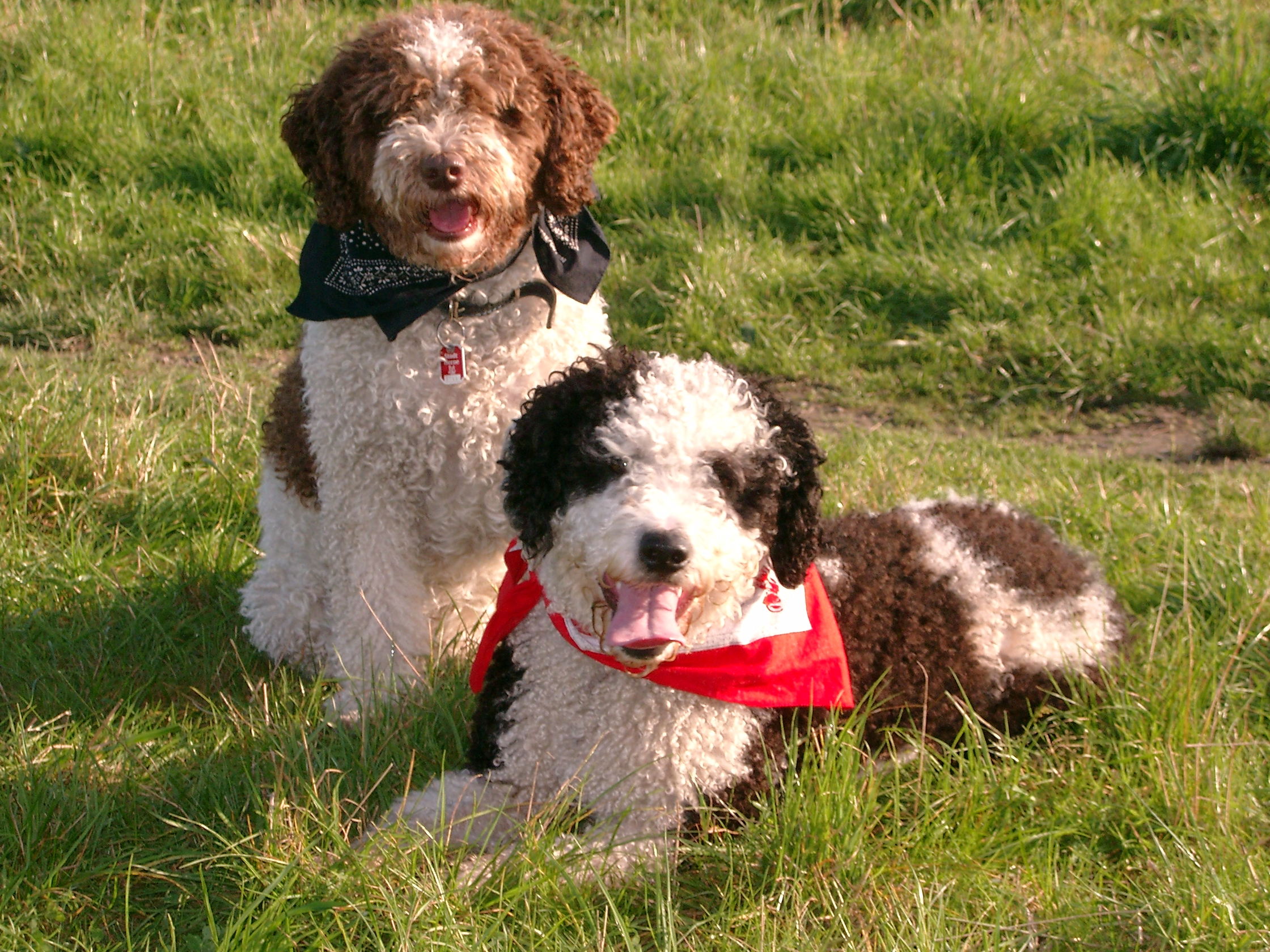 Perro de Aguas in weiss mit braun und schwarz-weiss Autor:Susanne Lorenz eigenes Bild Datum der Aufnahme:10.2003